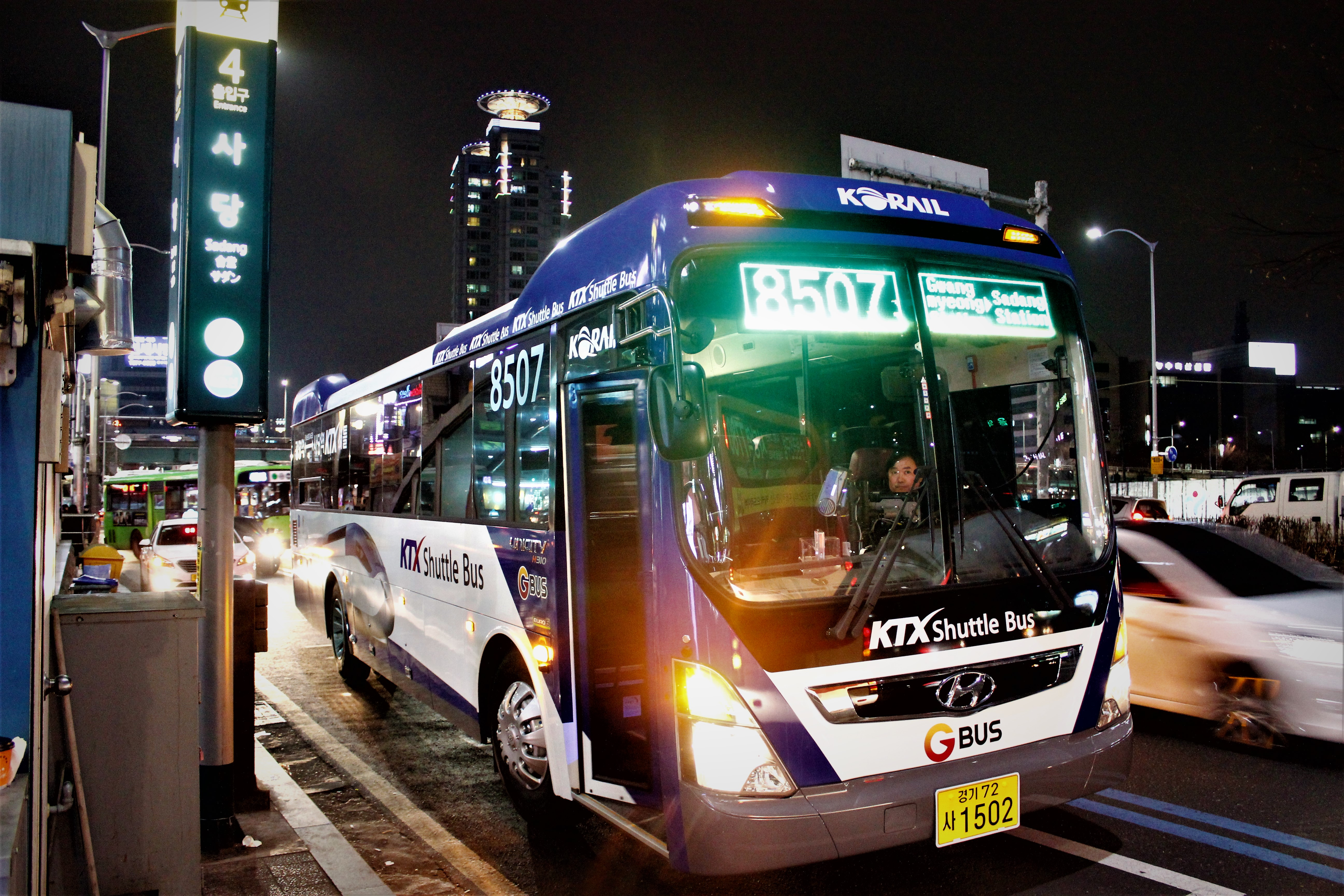 KTX 셔틀버스로 운행되는 8507번